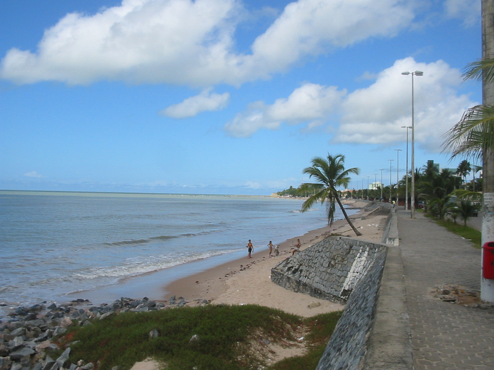 João Pessoa (Paraíba), Brasil. Praia de Manaíra. Ao fundo a Praia de Tambaú. João Pessoa (Paraíba), Brasil. Manaíra and Tambaú beachs.